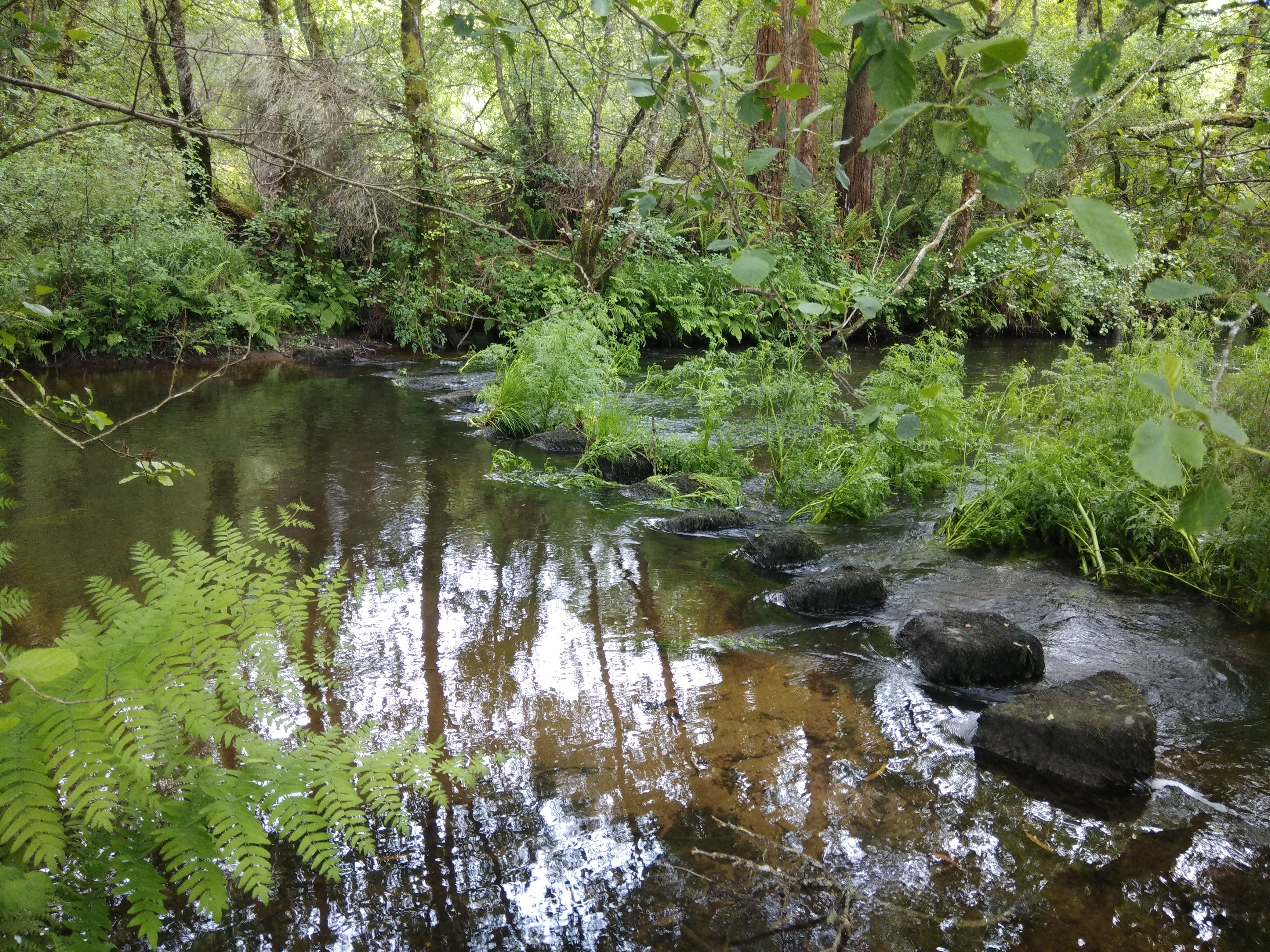 Pasos no Mandeo, entre A Espiñeira e Samel (Curtis, Galiza).